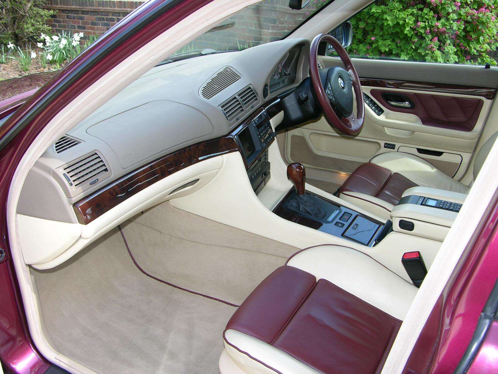 1998 BMW 740i Individual